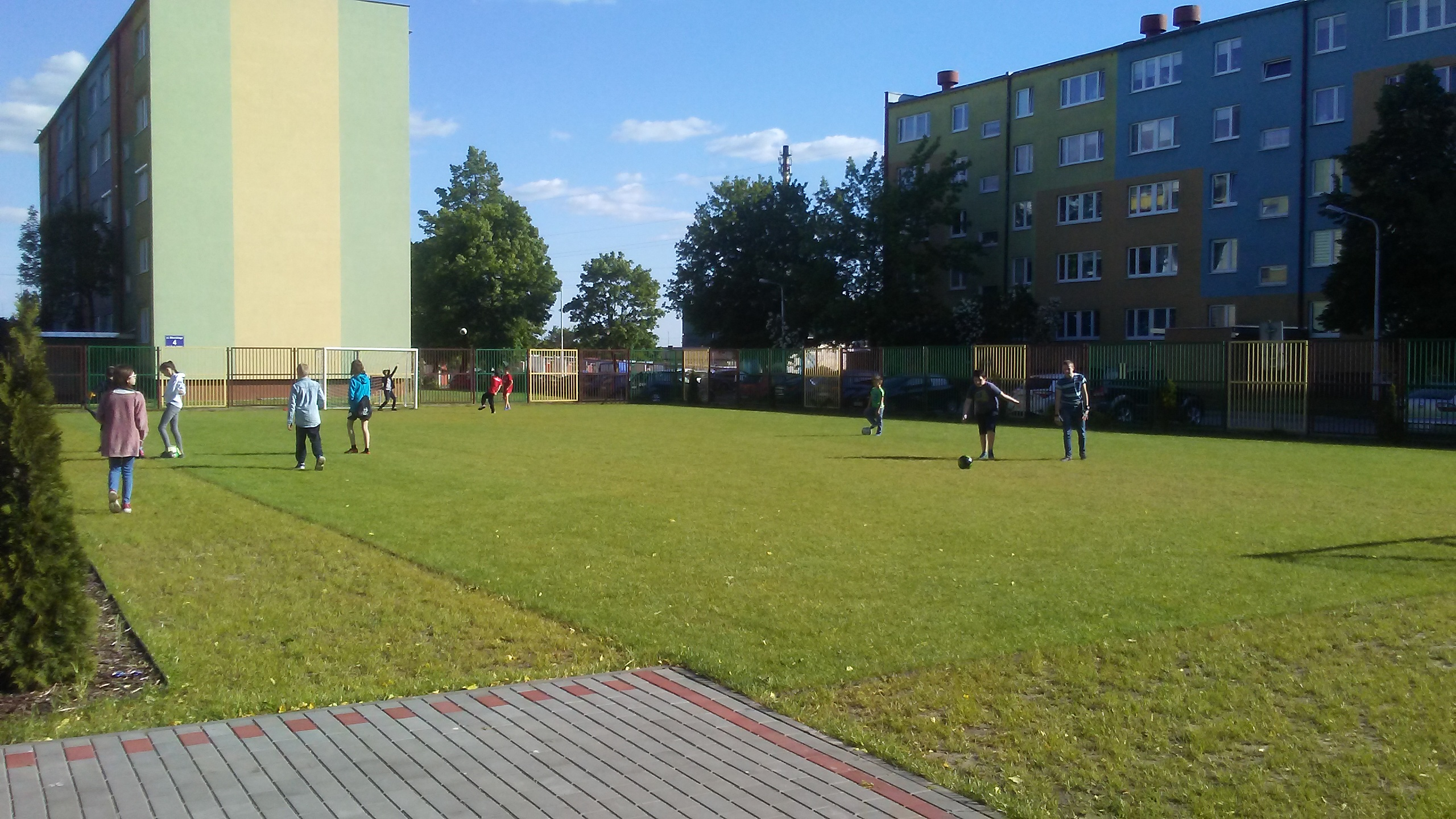 Boisko przy ulicy Sikorskiego w Tomaszowie Mazowieckim. Osiedle mieszkaniowe Hubala I